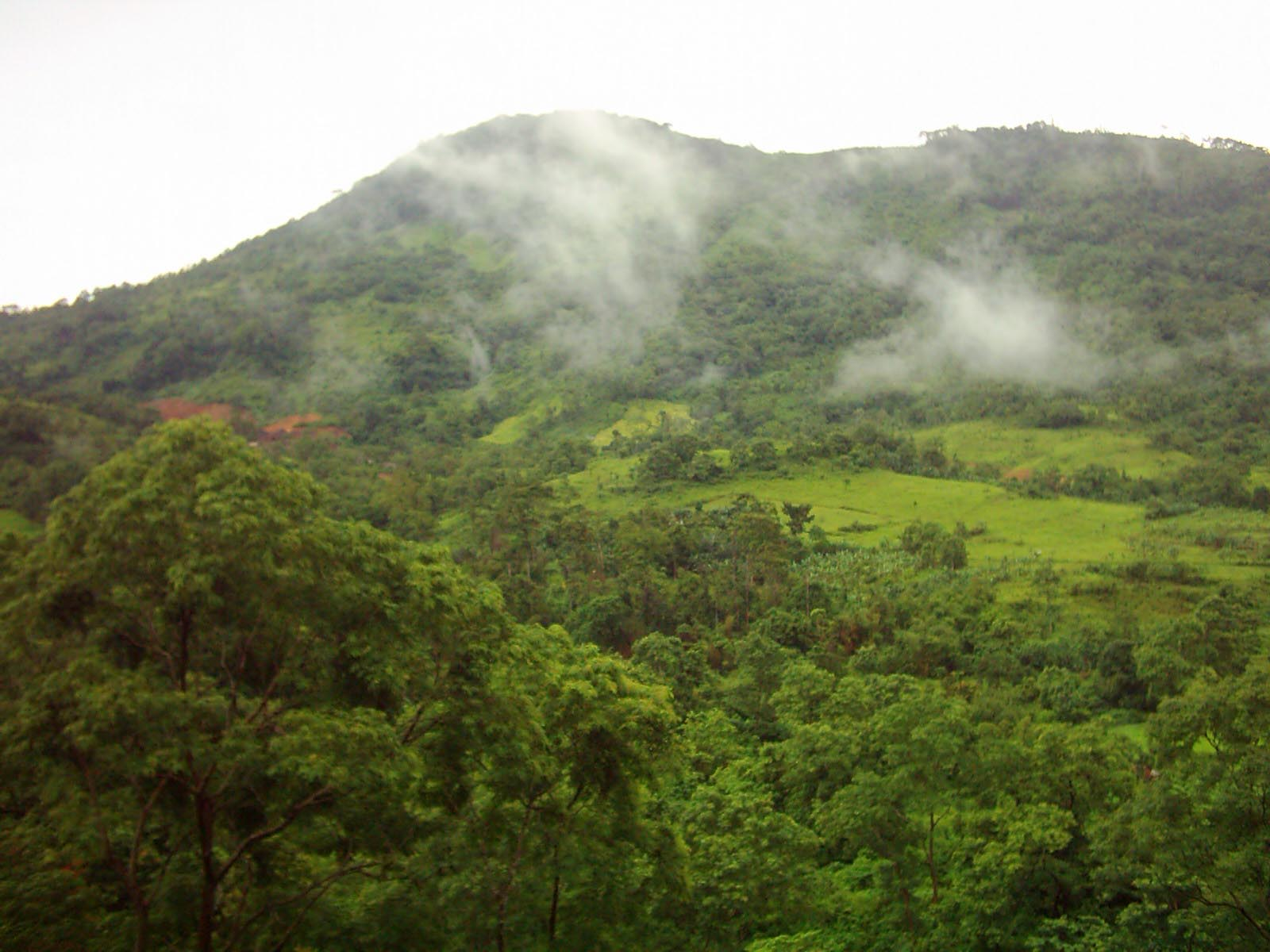 dari kamera digital